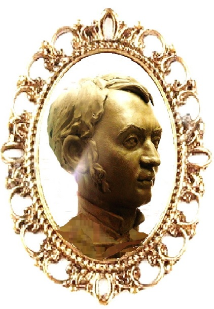 Charles-Jean Baptiste Bonnin. Obra del artista plástico Arturo Ordaz. El Dr. Arturo Ordaz es un distinguido profesor de carrera de la Universidad de Sonora, y es presidente de la Academia de Administración Pública en el Departamento de Sociología y Administración Pública.